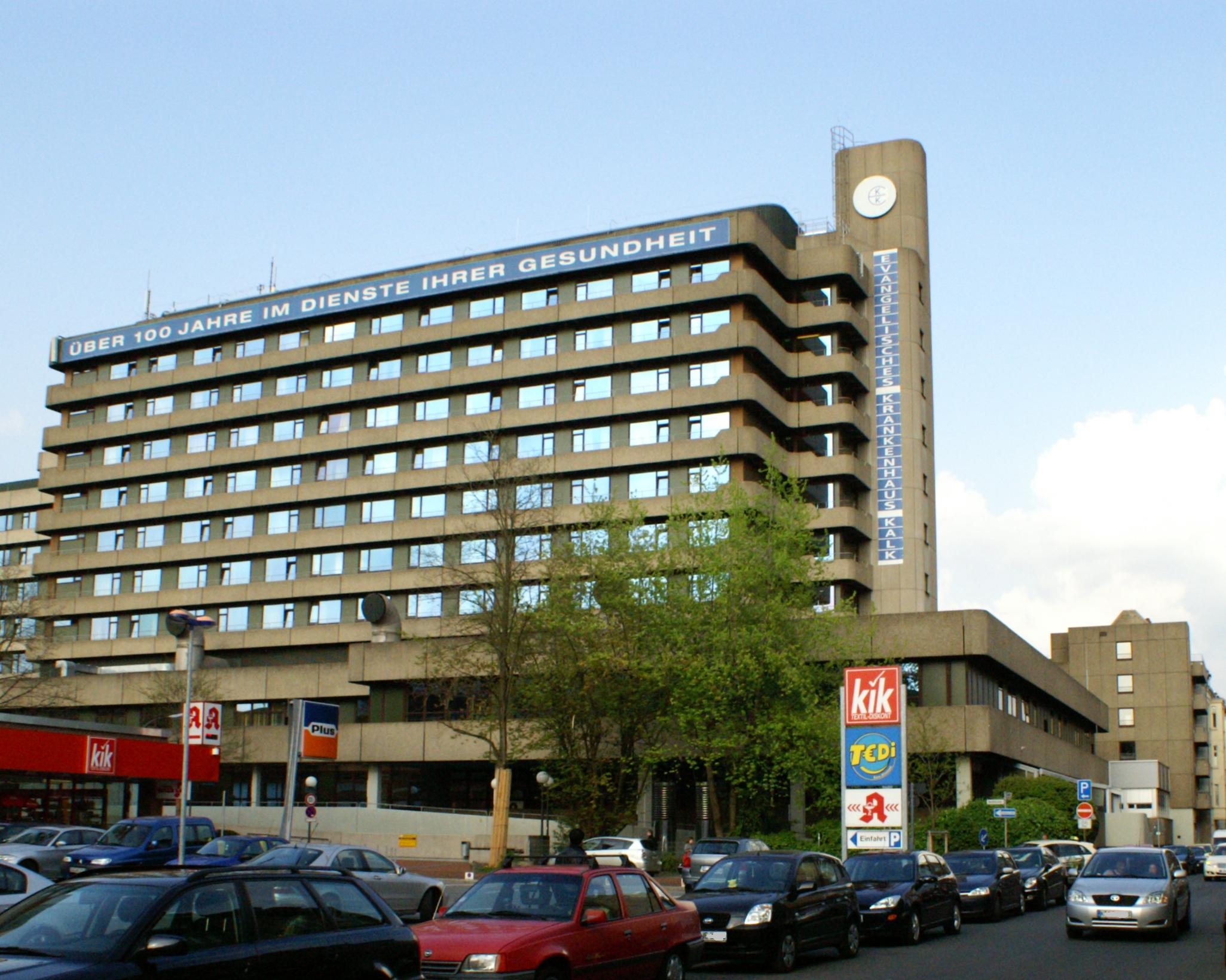 Das Evangelische Krankenhaus in Köln-Kalk, Buchforststraße